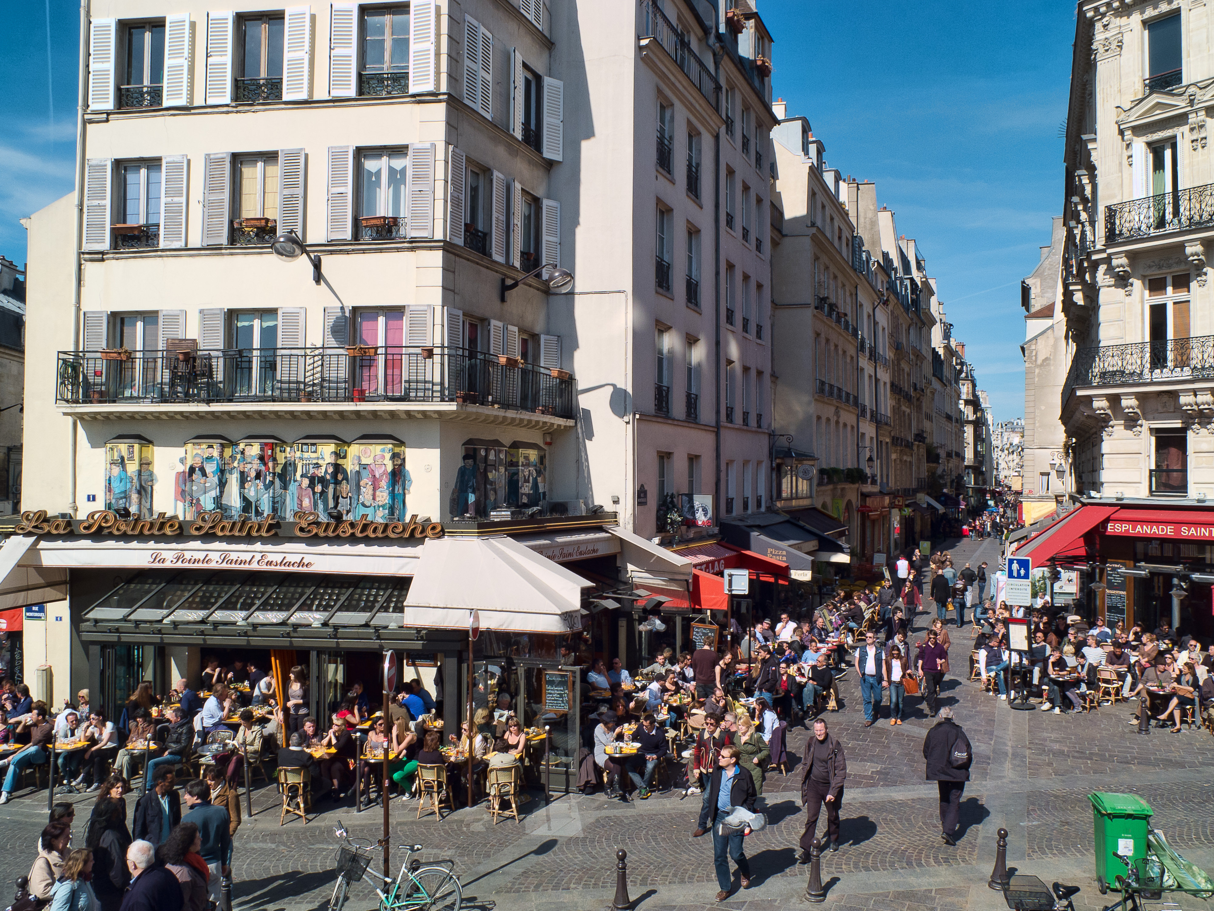 Vue prise du forum des Halles, perspective de la rue Montorgueil vers le nord; restaurant La Pointe de Saint-Eustache, 1 rue Montorgueil, Ier arrondissement, Paris, France.